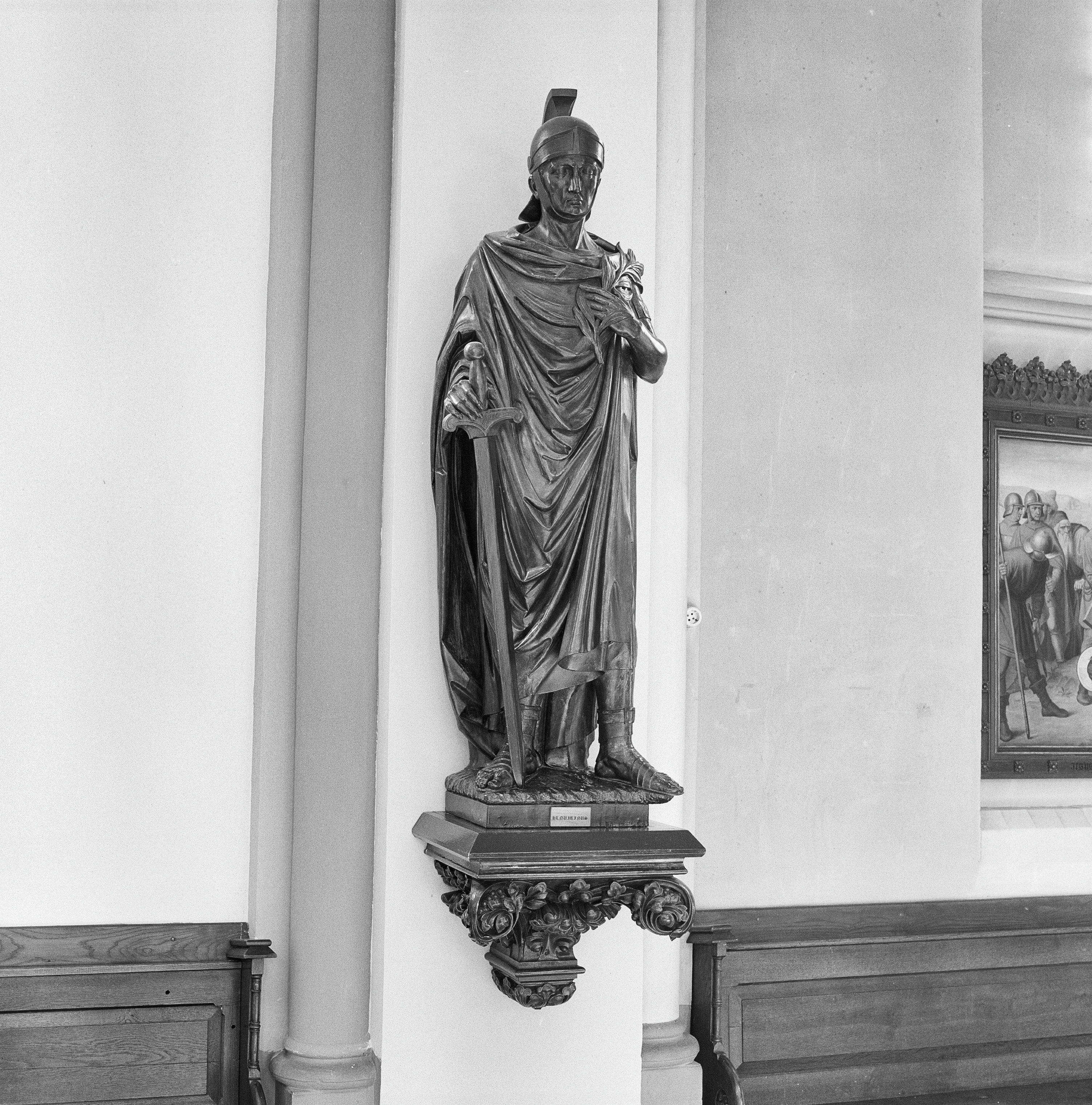 Rooms-Katholiek Sint Clemenskerk: Interieur, heiligenbeeld Sint Querinus